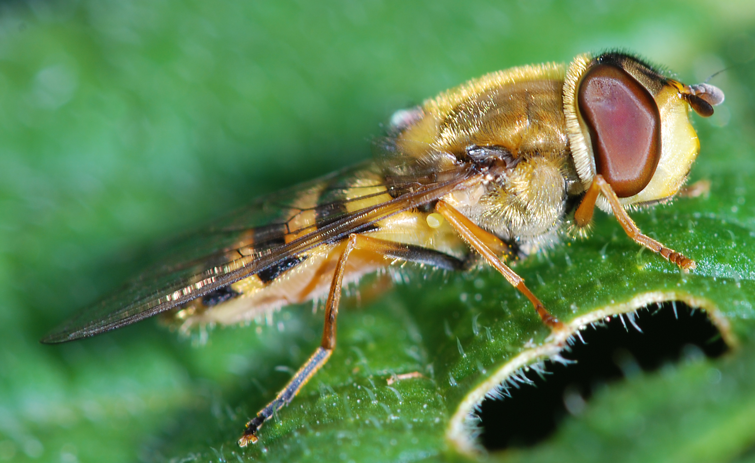 Syrphus vitripennis female hoverfly